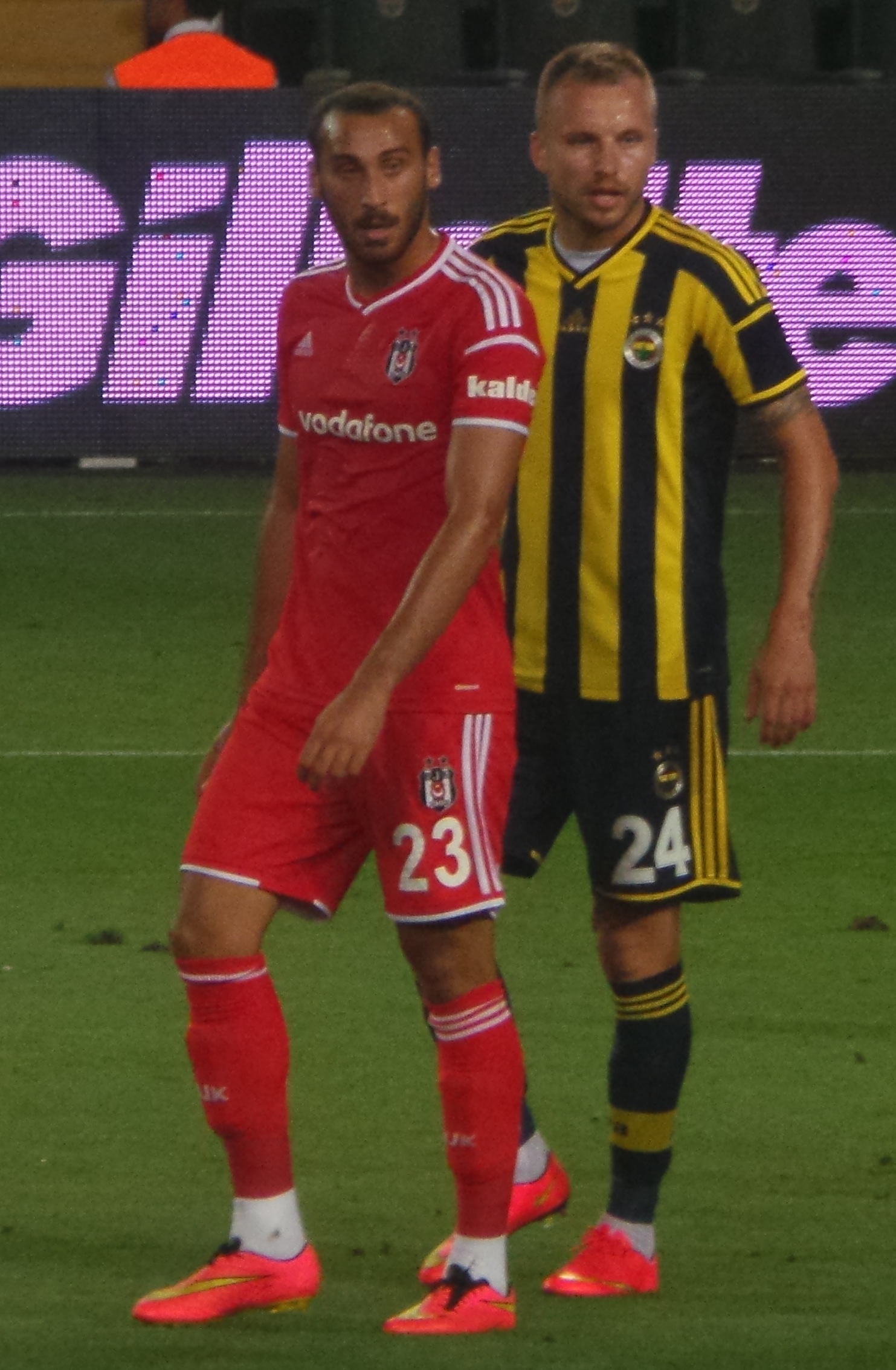 Cenk Tosun (2) - SOMA Turnuvası